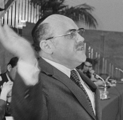 Joods Wereldcongres over Rusland in Brussel, Belgie; opperrabbijn van New York, Herschel Schacter, aan het woord